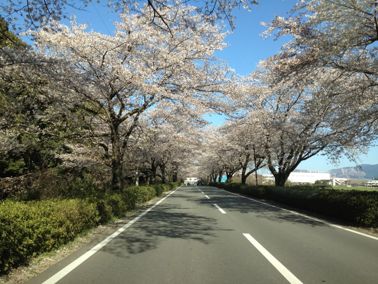 HSR九州の桜並木 Sakura tree namiki